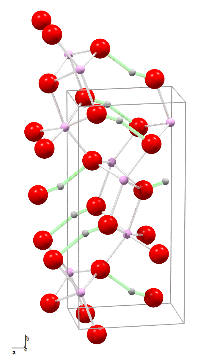 Struktur von Diaspor - AlOOH